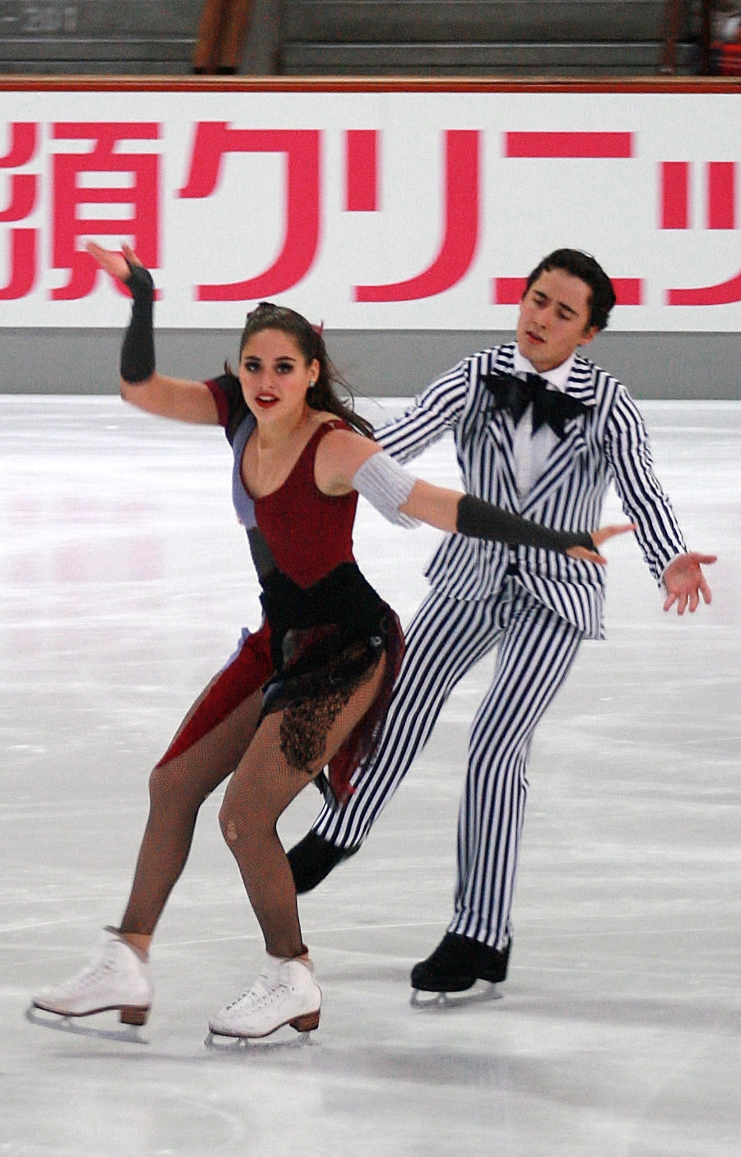 Пилар Майкава Морено и Леонардо Майкава Морено (Мексика) на 2013 Nebelhorn Trophy